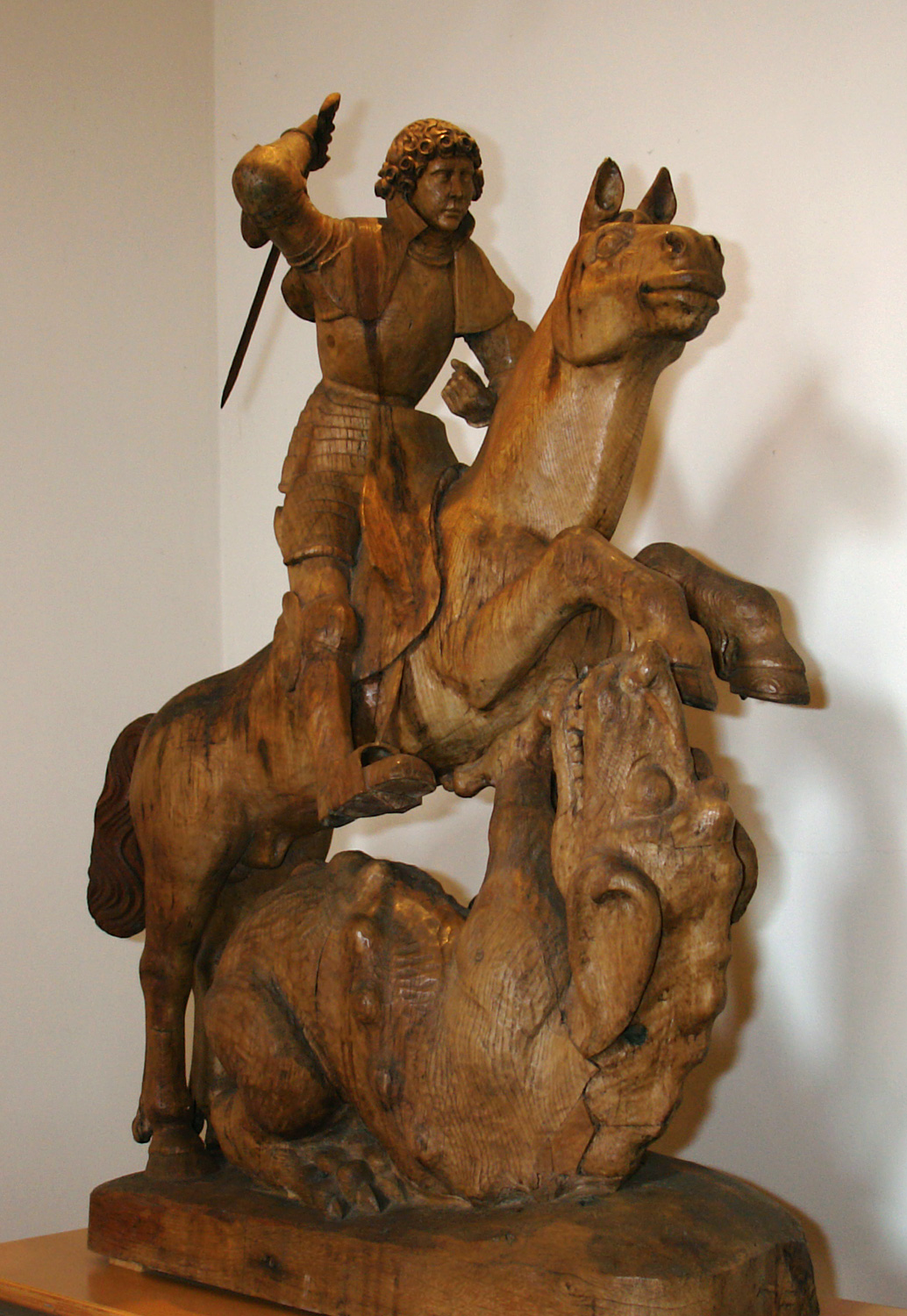 Kirche St. Lorenz (17.Jh.) in Lübeck-Travemünde: Holzskulptur St. Jürgen (St. Georg) mit dem Drachen. Spätgotisches Schnitzwerk aus der Zeit um 1520. Die Skulptur war früher farbig gefasst, die Fassung ist jedoch verloren gegangen. Sie stammt aus dem um 1970 abgerissenen Siechenhaus St. Jürgen bei Travemünde